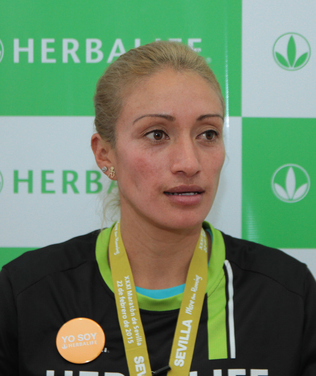 Quito, 26 feb (ANDES).- La atleta ecuatoriana Rosalva Chacha consiguió los tiempos requeridos para su ingreso a las siguientes olimpiadas. Fotografías: Carlos Rodríguez/ANDES.